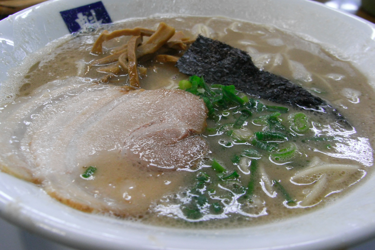 小倉にある魁龍の豚骨ラーメン。どとんこつが特徴。